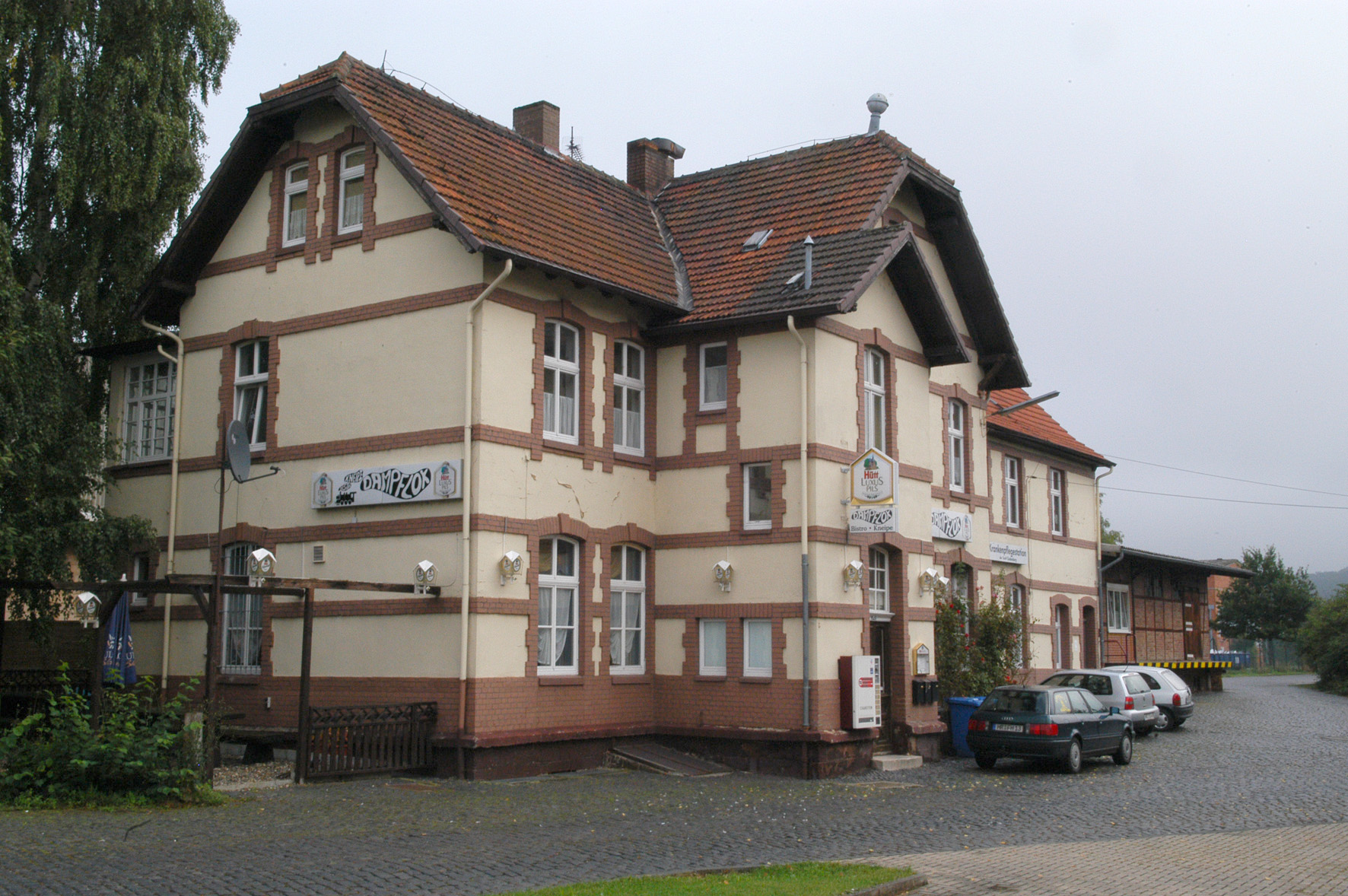 Ehemaliger Bahnhof Gudensberg selbst fotografiert Aufnahme vom 3. Oktober 2005